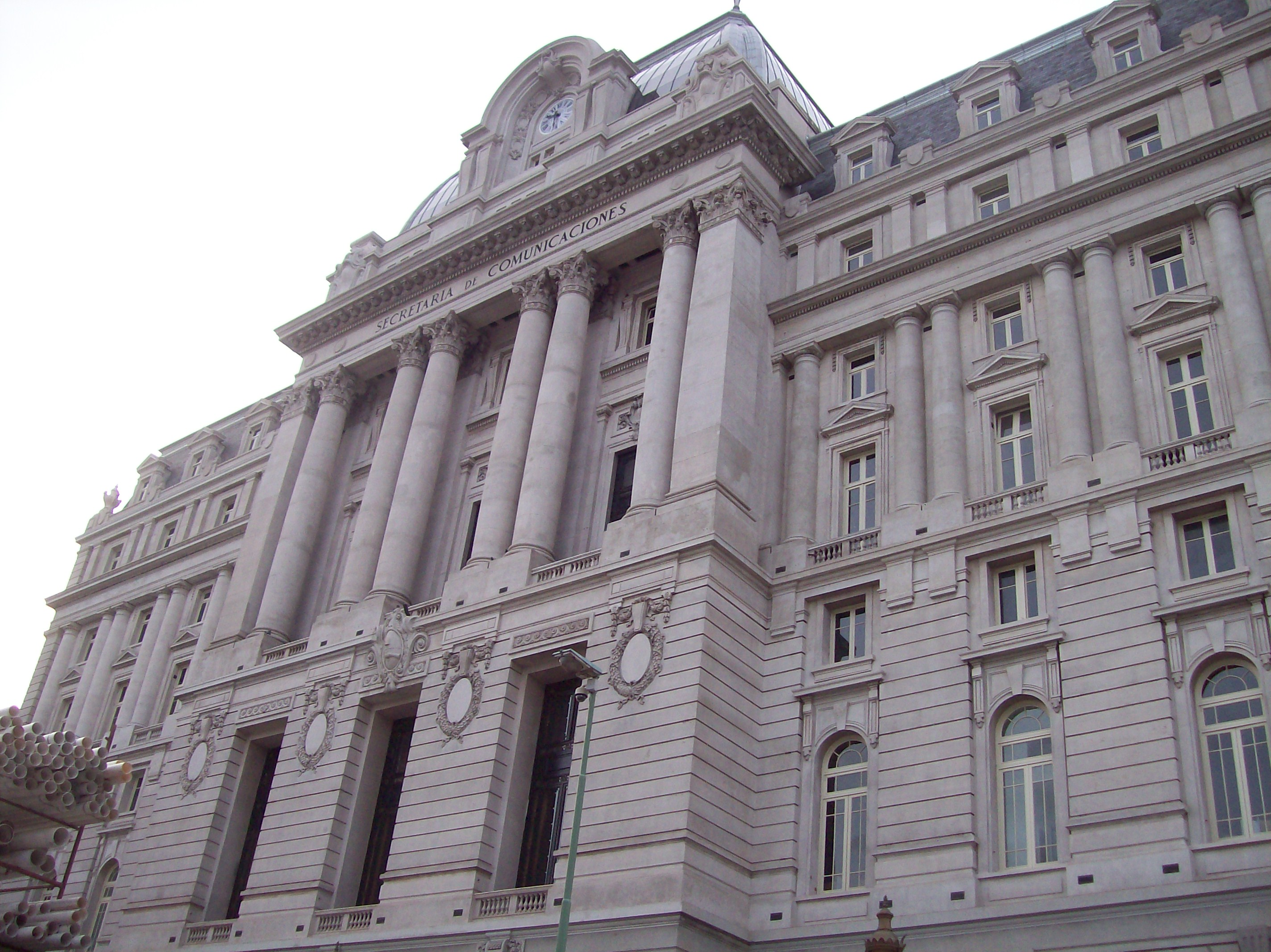 Palacio de Correos